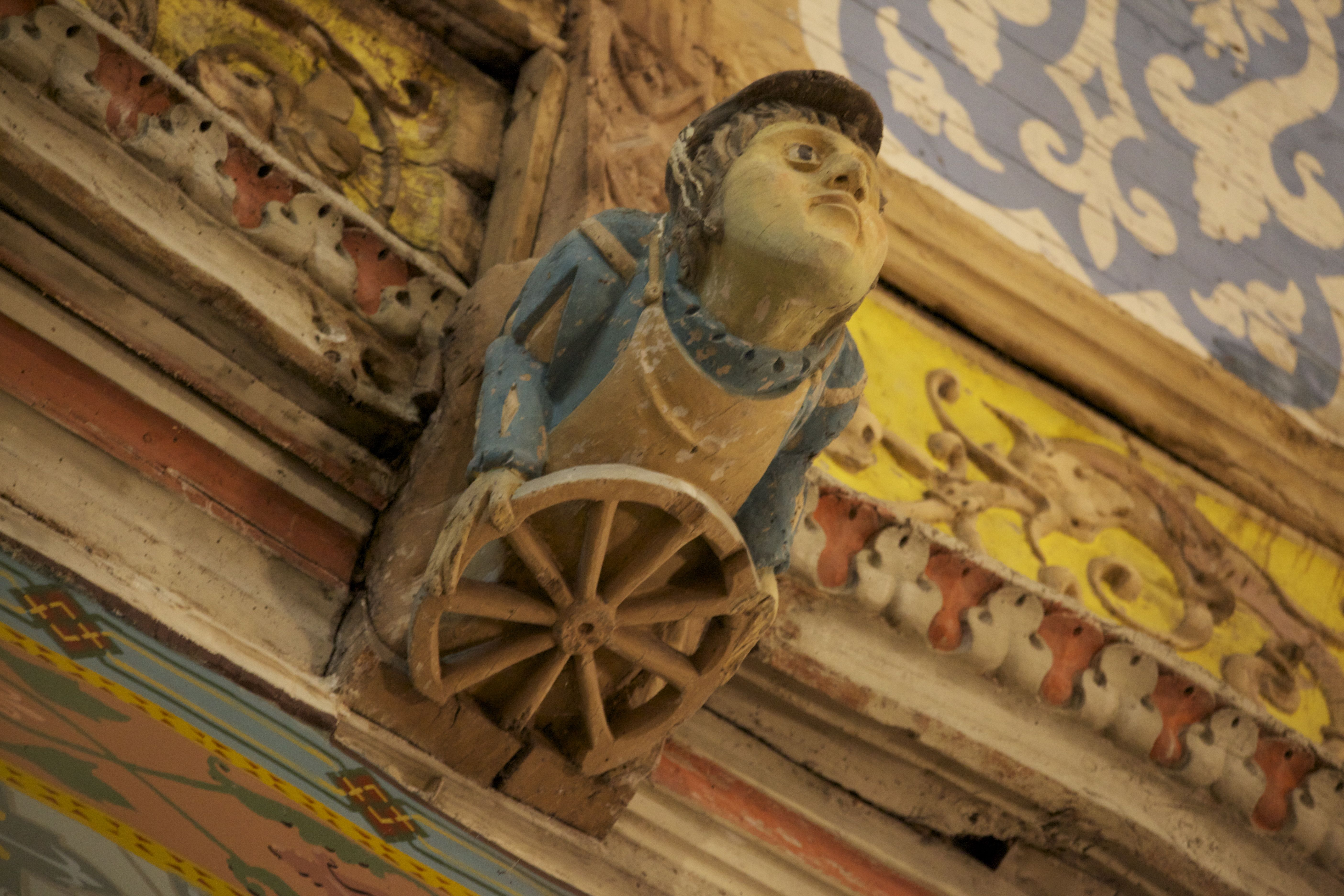 statuaire naive de l'église d'heudicourt